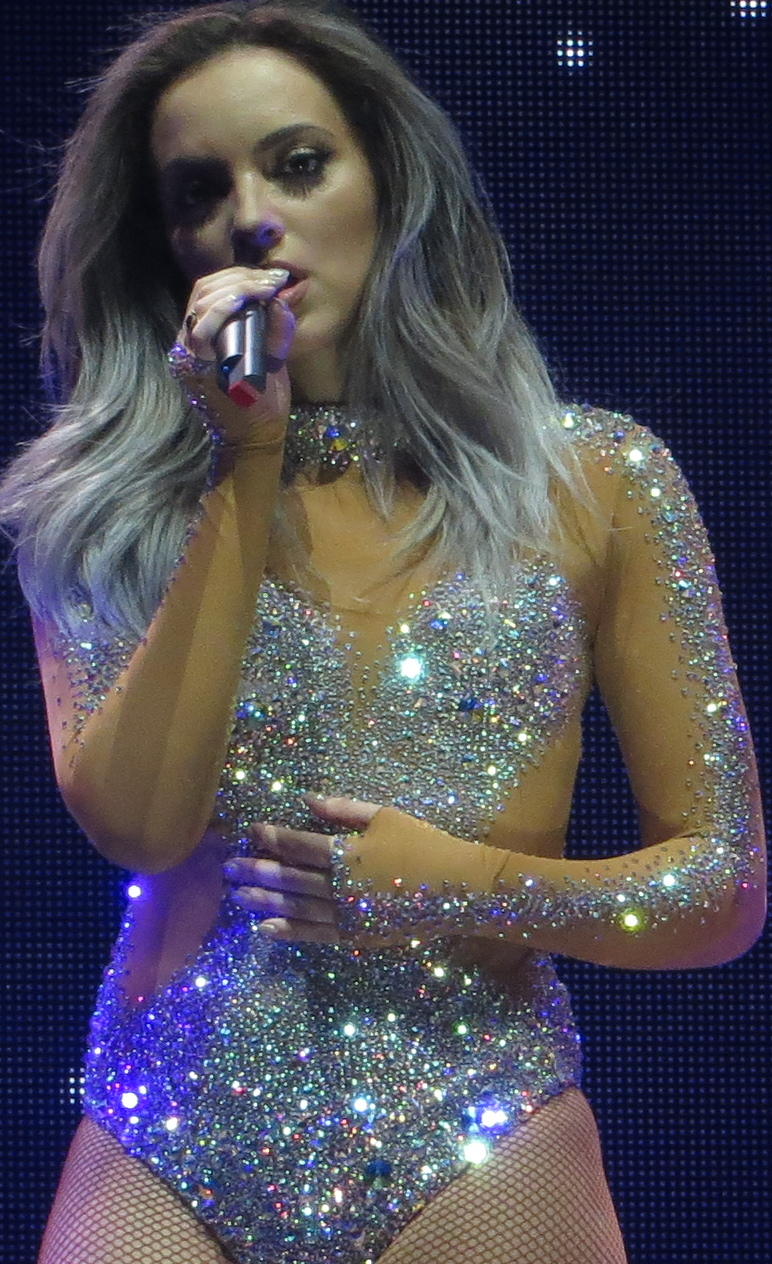 Little Mix 2